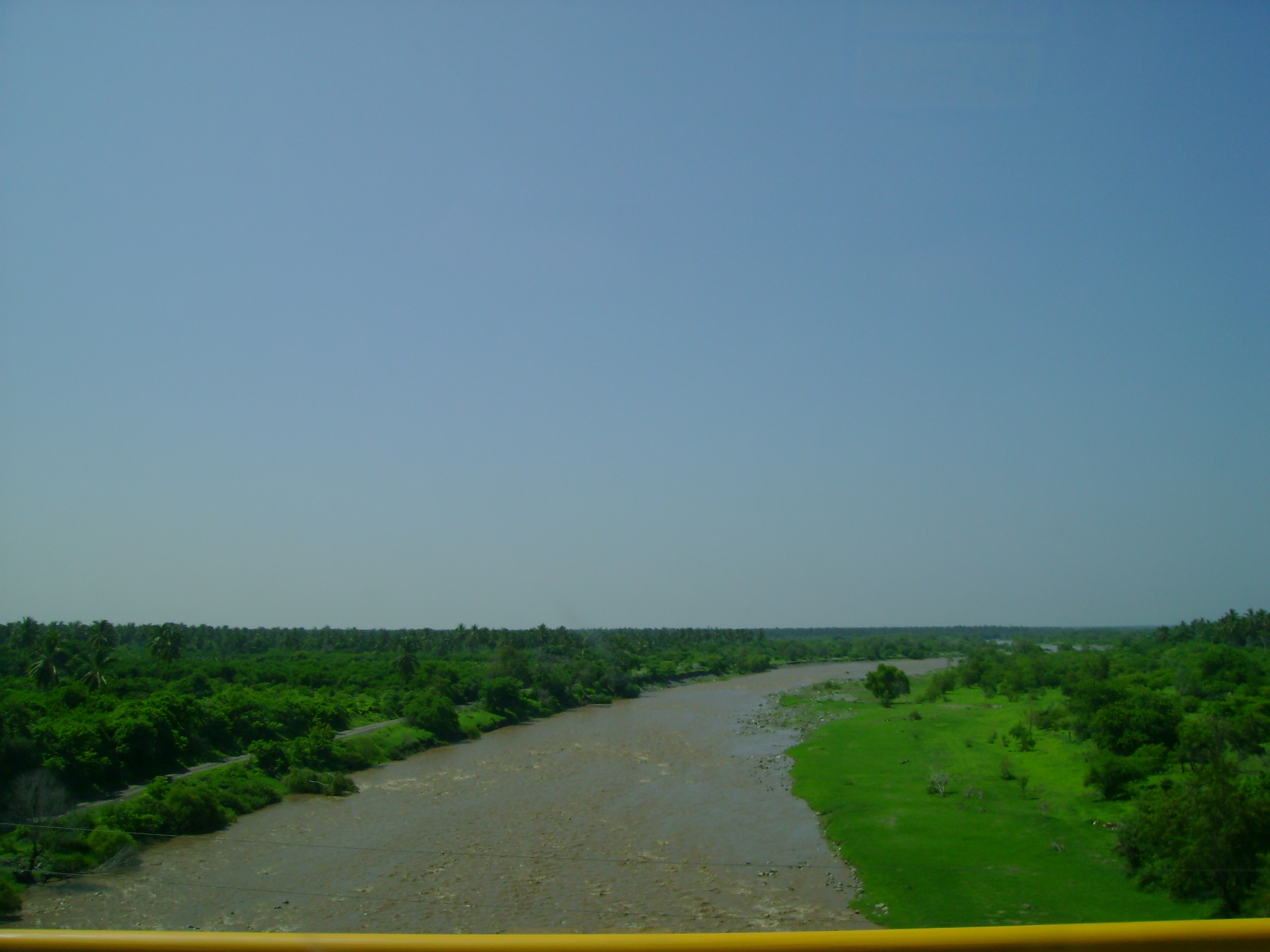 Fotografía del Río Armería, en el estado de Colima